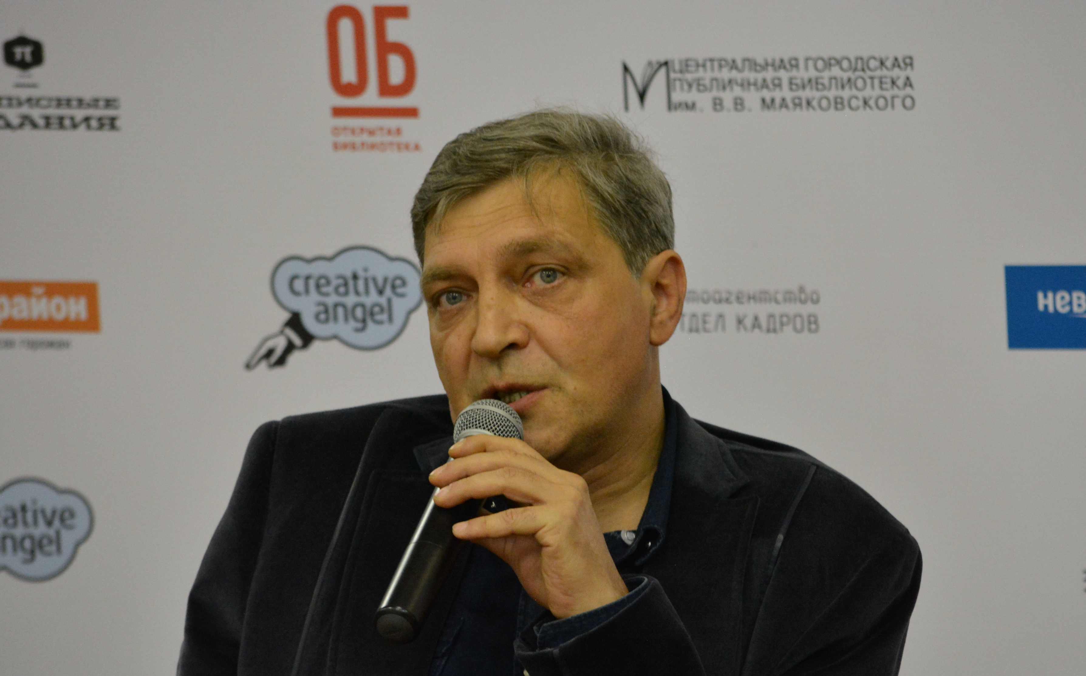 Александр Невзоров на дебатах в рамках «Открытой библиотеки» в Центральной городской публичной библиотеке им. В. В. Маяковского (Санкт-Петербург) 27 сентября 2014 года